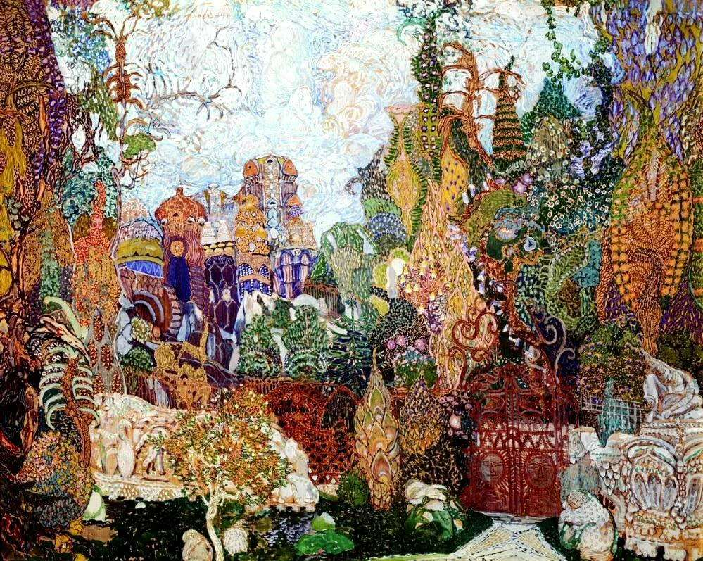 Душное Кащеево царство. 1910 Эскиз декорации к балету И.Ф.Стравинского "Жар птица" Бумага, гуашь, акварель, бронзовая краска. 82 x 102 см Государственная Третьяковская галерея